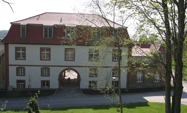 Portal des ehemaligen Internats Schloss Bischofstein im Eichsfeld. Sonstiges: Bild darf zur Weiterempfehlung des Internates Schloss Bischofstein verwendet werden. GNU Free Documentation License.